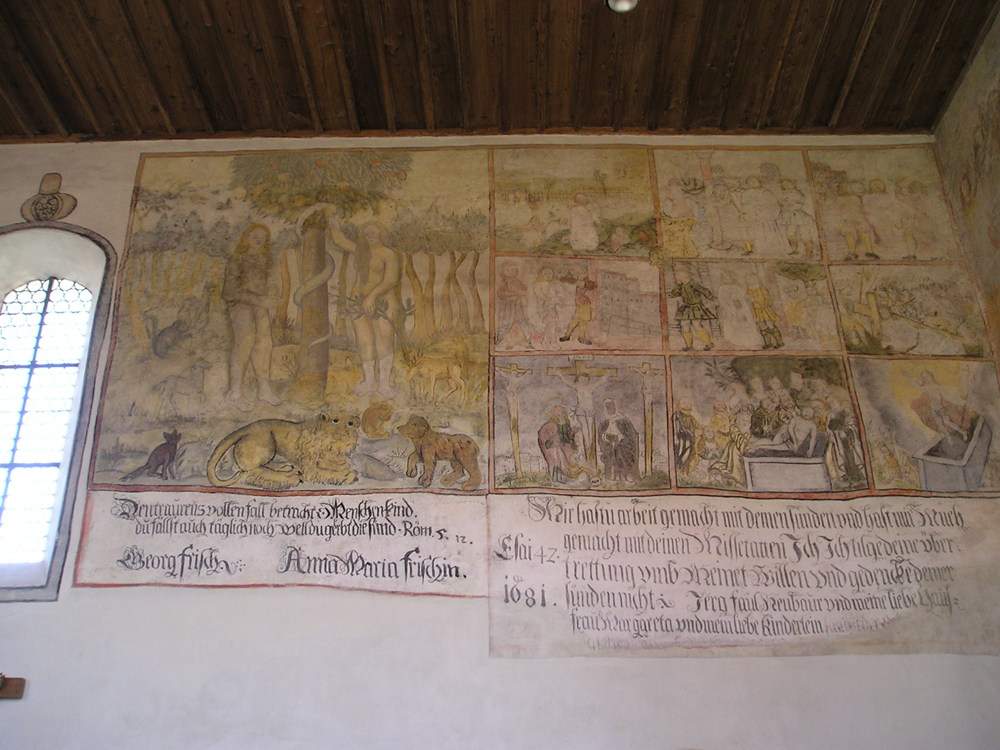 Bühl i. Ries, Gemeindeteil von Alerheim im Landkreis Donau-Ries (Bayern), Evang. St.-Marien-Kirche, Fresken an der Langhaus-Nordwand